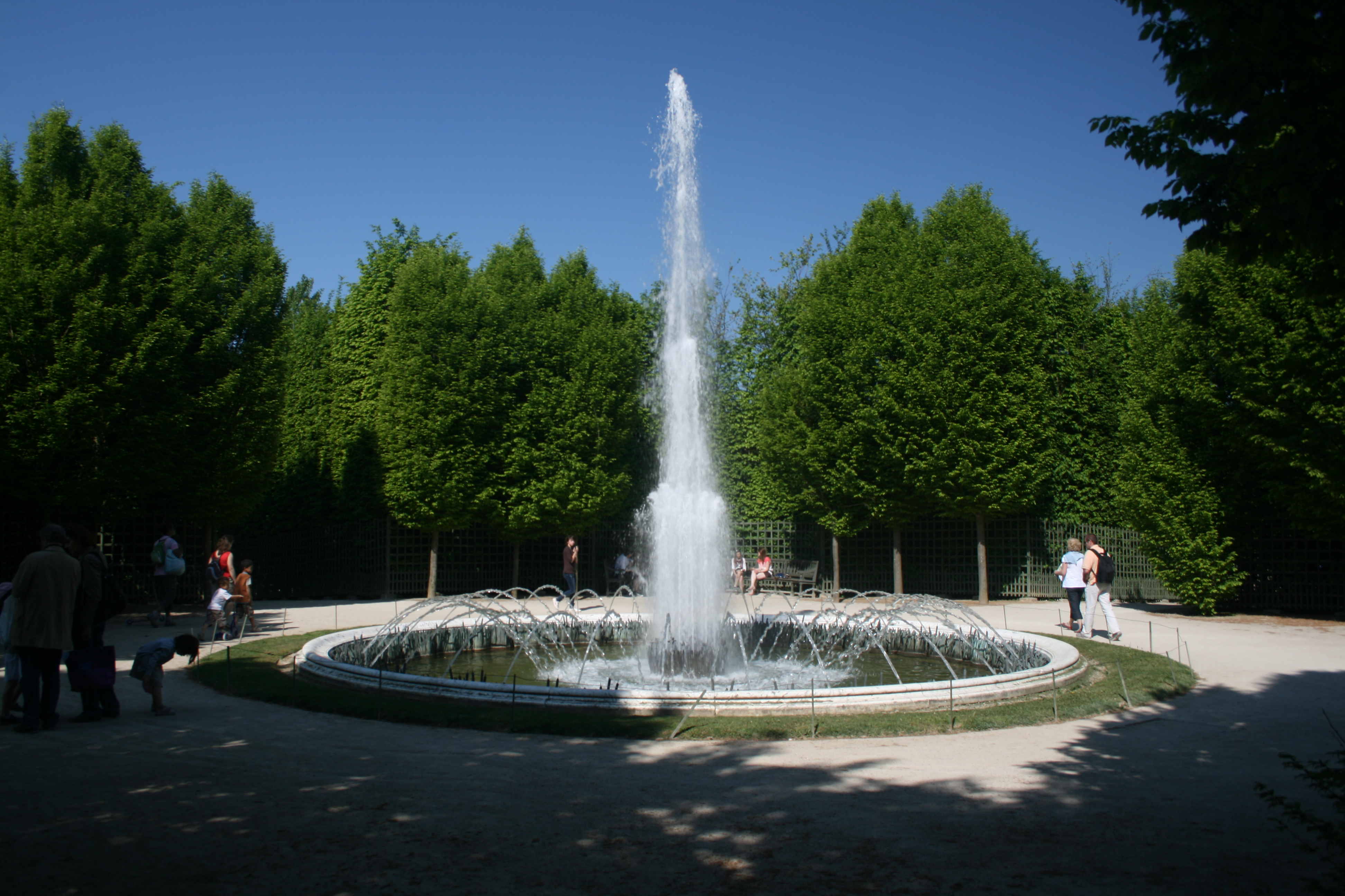 Bosquet de la Girandole, dans le parc du Château de Versailles. Pendant du Bosquet du Dauphin, c'est l'un des premiers bosquets créé dans le parc. Il tire son nom des motifs décoratifs et des effets hydrauliques de son bassin central.